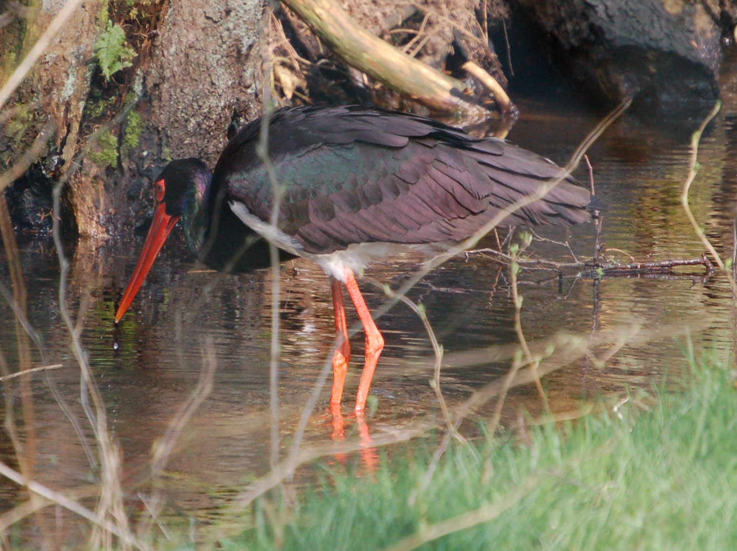 Schwarzstorch (Ciconia nigra) im Wildpark Eekholt.